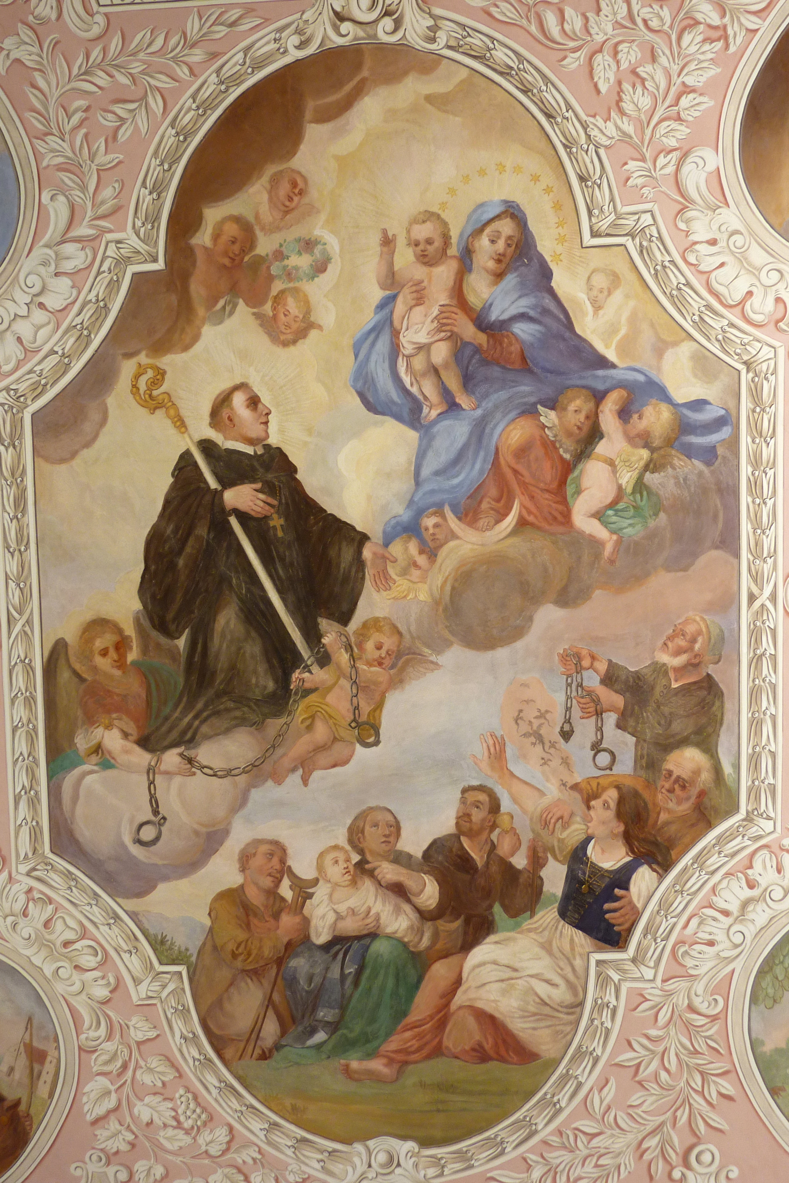 Katholische Filialkirche Hl. Dreifaltigkeit und St. Leonhard in Bocksberg, einem Ortsteil von Laugna im Landkreis Dillingen an der Donau (Bayern), Deckenfresko im Langhaus, von 1748, Darstellung des hl. Leonhard, der auf einer Wolke Maria entgegenschwebt